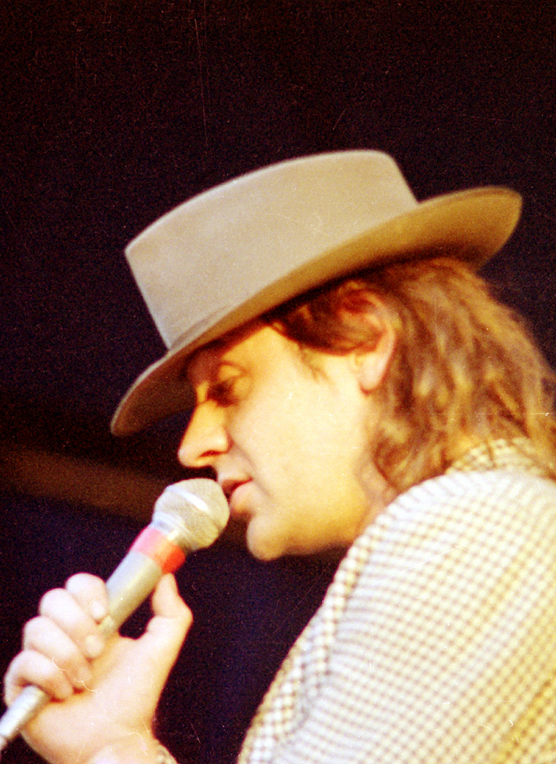 Der Musiker Udo Lindenberg (1987) - Titel des Werks: "Udo Lindenberg (1987)".